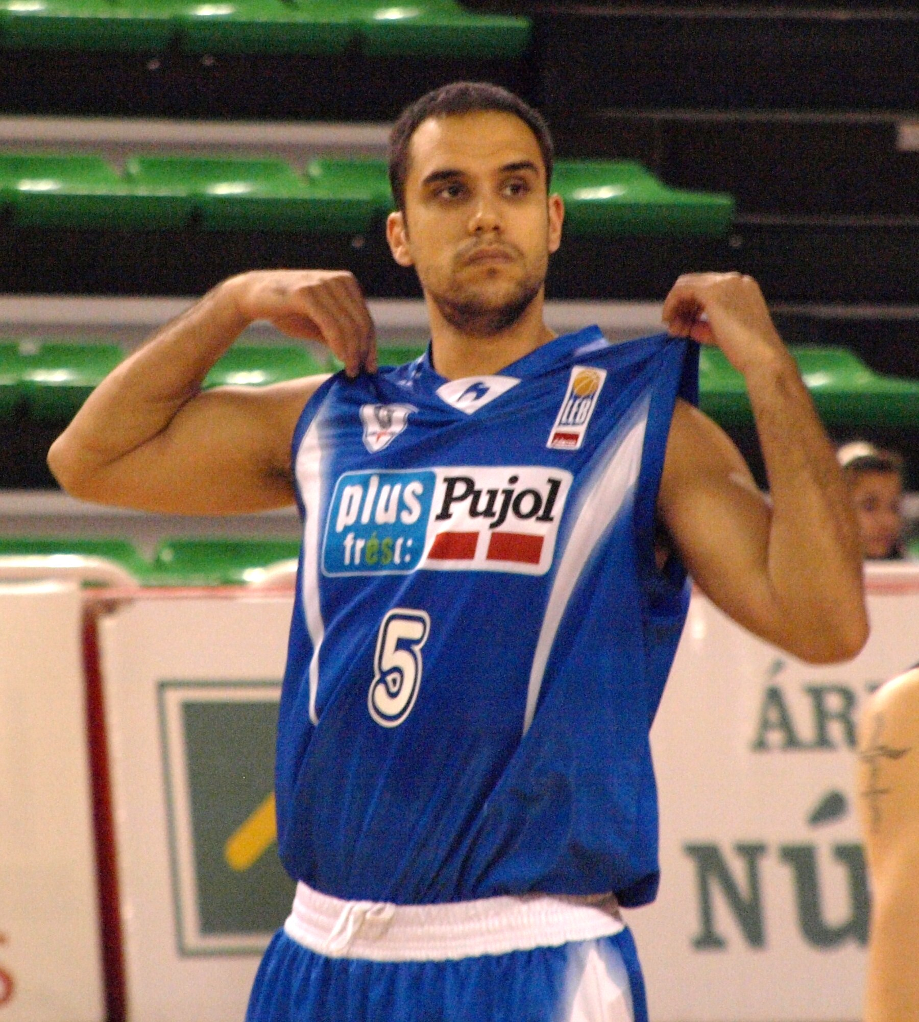 Javier Mendiburu, con la camiseta del Plus Pujol Lleida en el partido que su equipo disputó ante el Cáceres 2016 Basket en enero de 2009 en el pabellón Mutiusos "Ciudad de Cáceres" de la liga LEB Oro 2008/09